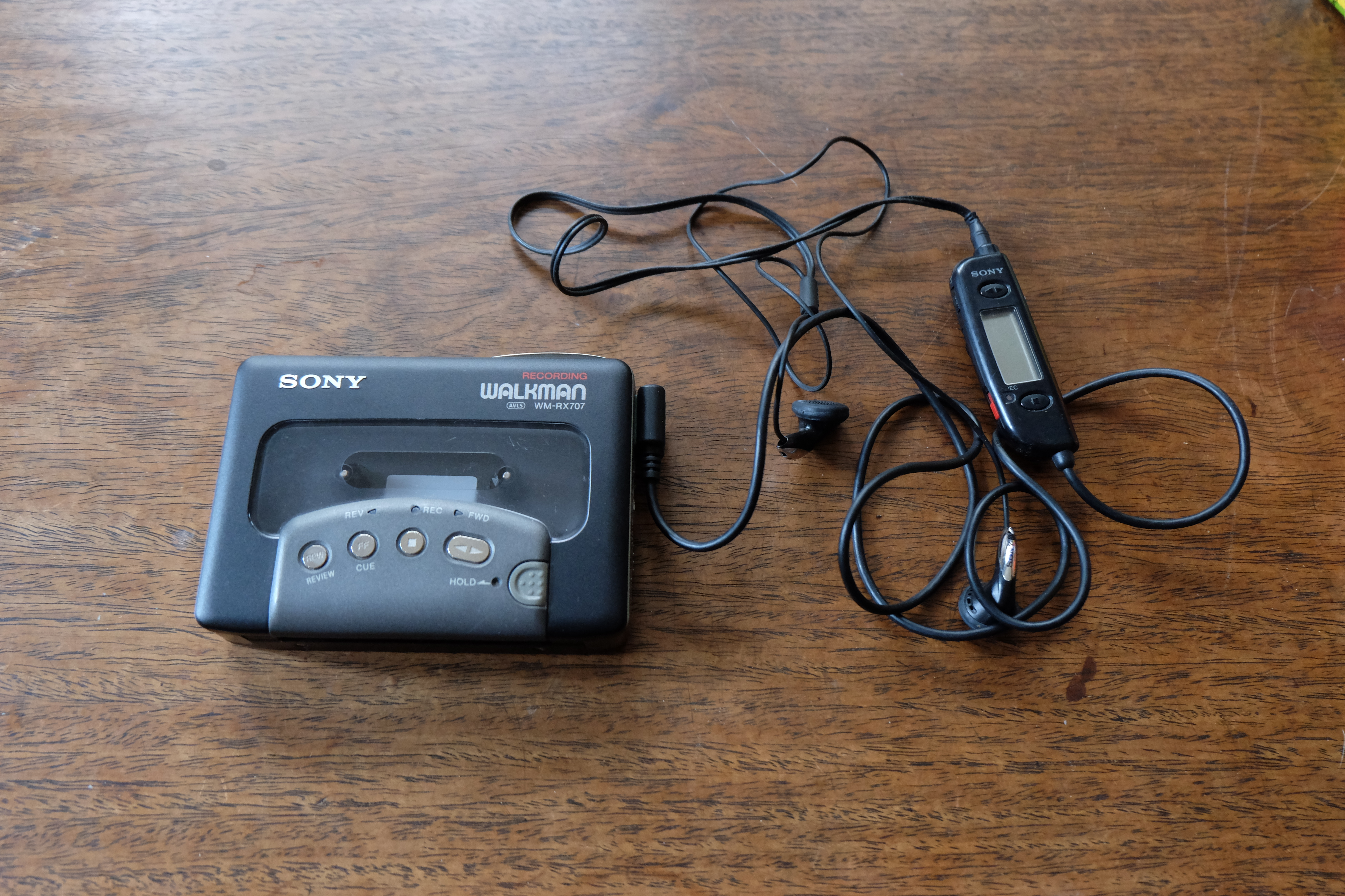 ソニー ウォークマン WM-RX707